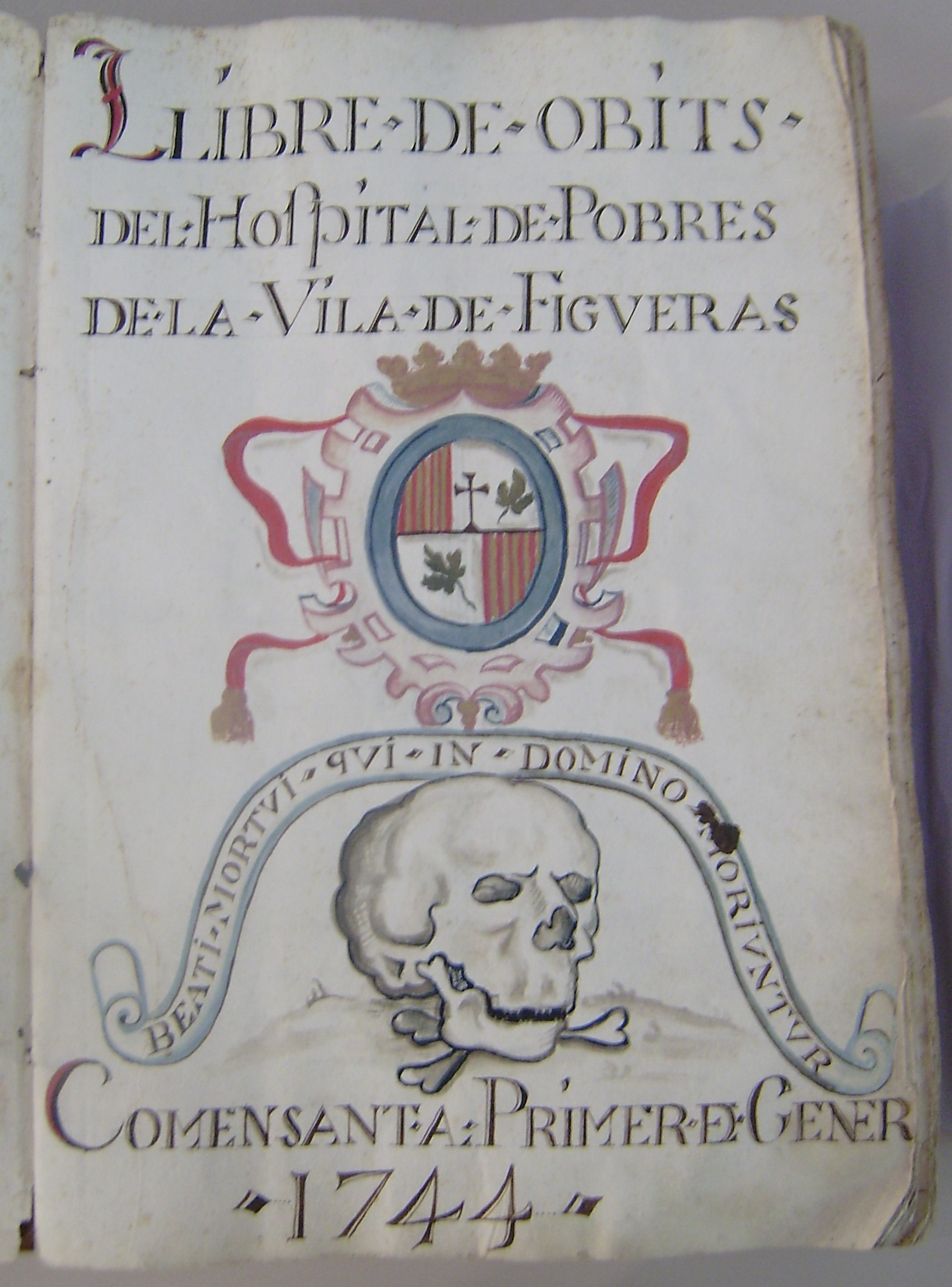 El fons de l´Hospital de Pobres de Figueres aplega la documentació d´aquesta institució figuerenca, fundada l´any 1313, des del 1451 fins al 1993, encara que les sèries documentals contínues comencen al final del segle XVIII. Destaquen els documents de les estades militars i civils, tant del país com estrangers, durant els nombrosos conflictes bèl.lics que ha patit el país des de la Guerra Gran fins abans de la passada guerra civil, perquè durant aquest últim trienni l´Hospital fou requisat i funcionà com a hospital militar. Fou bombardejat el 1939 i es reconstruí a partir del 1943, amb l´ajut de Regiones Devastadas, en un terreny descampat situat darrere del Parc Bosc municipal, on avui encara hi és amb nombroses ampliacions i millores posteriors. Dades tècniques Títol: Llibre d´òbits de l´Hospital anterior a la construcció del castell de Sant Ferran on figuren hospitalitzats treballadors d´aquesta obra. Data: 1744-1823 Suport material: paper amb enquadernació de pergamí Mides: 242 x 350 mm.